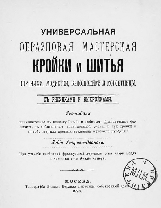 Книга для обучения кройки и шитью составленная Лидией Амировой-Ивановой при участии французских портнихи Клары Вордэ и модистки Амалии Катюр